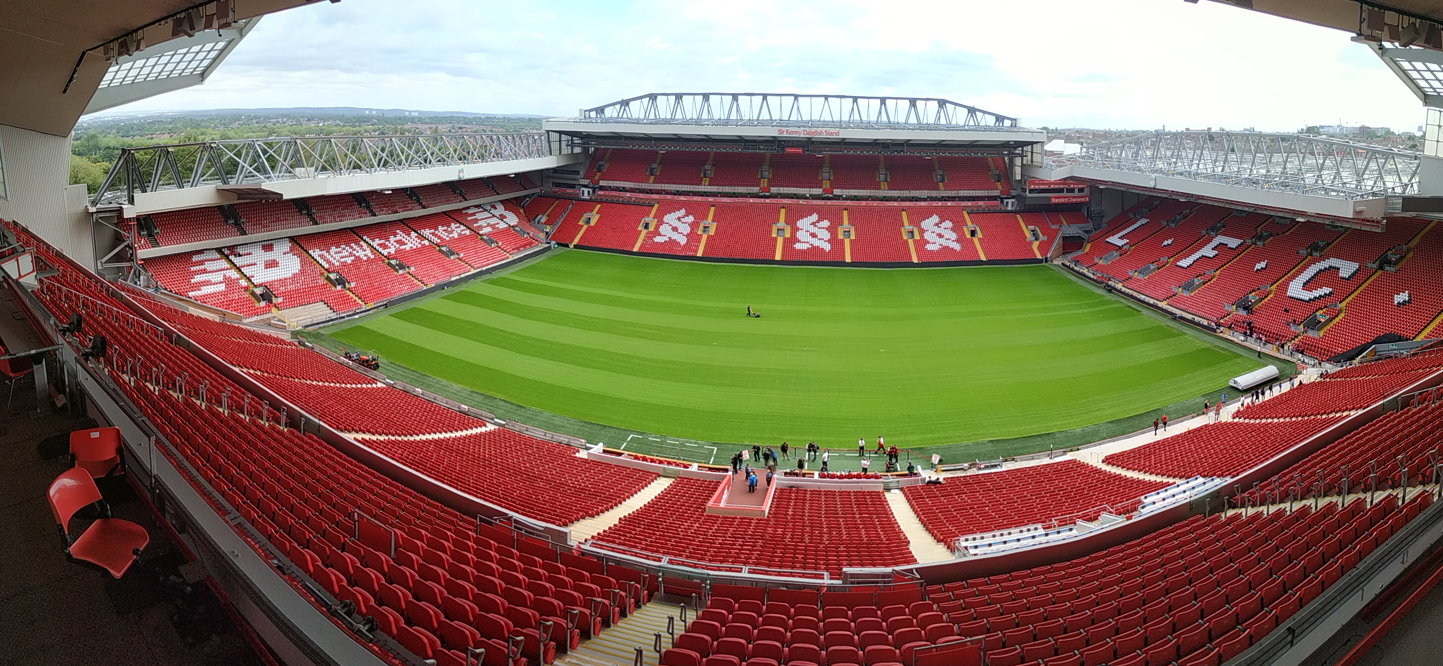 Vistas panorámicas del estadio de Anfield (Liverpool) desde dentro